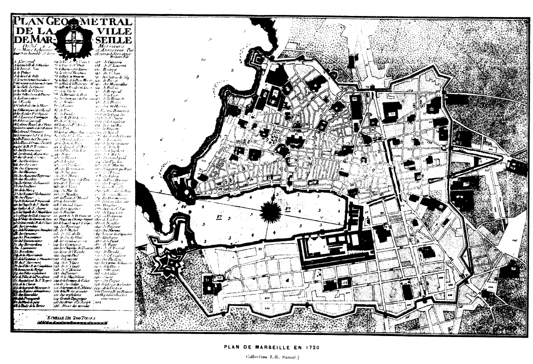 Plan de Marseille en 1720 tiré de Paul Gaffarel et le marquis de Duranty, La Peste de 1720 à Marseille & en France, Perrin et Cie, Paris, 1911. disponible sur Gallica